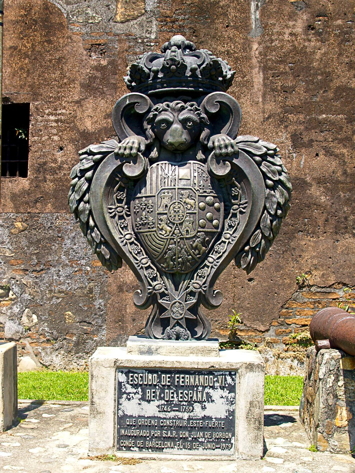 Monument at the Fortalezo de San Fernando de Omoa, Omoa, Honduras. Inscription reads: Escudo de Fernando VI Rey de España 1746–1759 Que ordeno construir este fuerte inaugurado por S.A.R. Don Juan de Borbon de Barcelona. El 15 de Junio 1979.